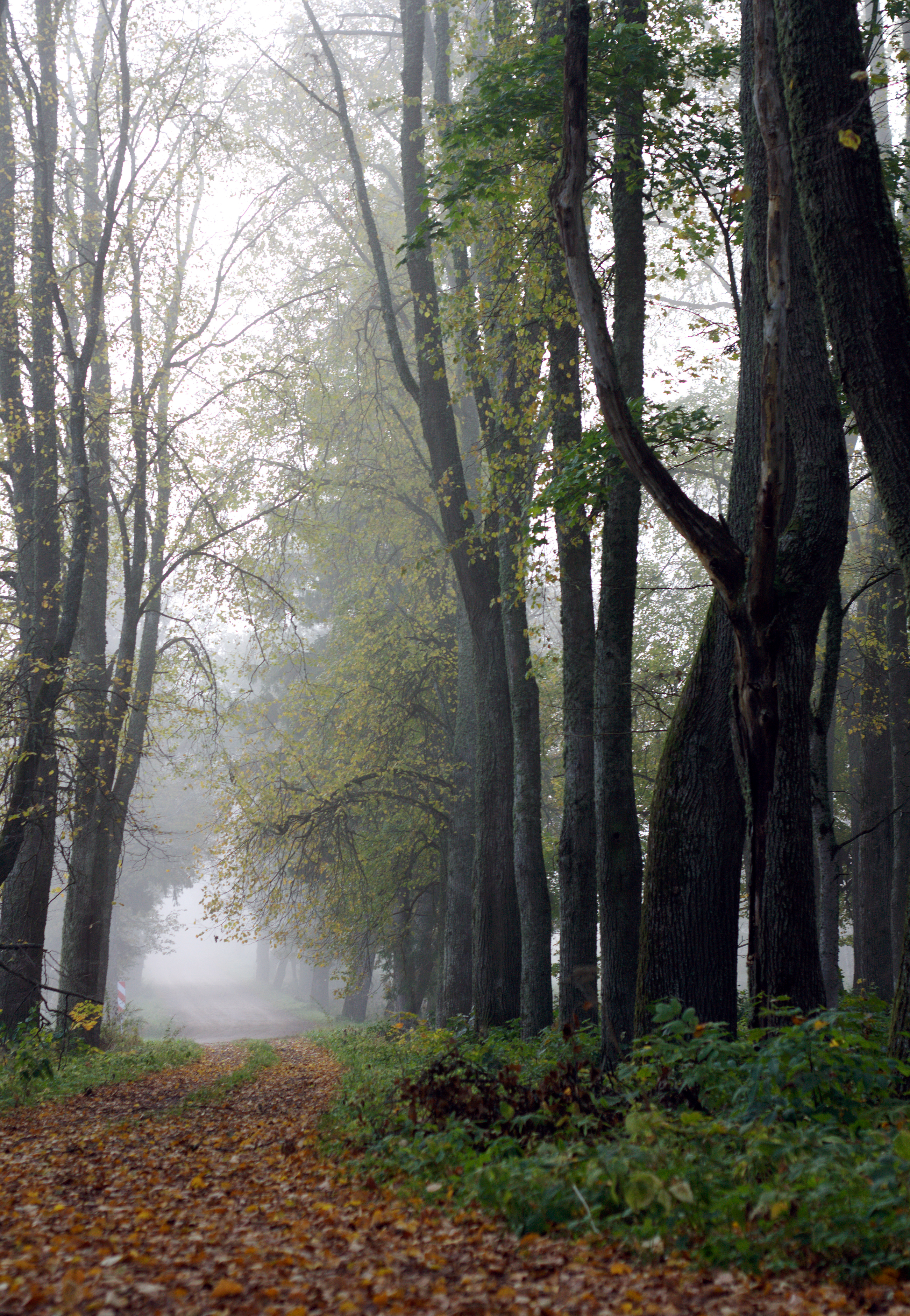 Joosu mõisa juurte viiv puiestee.